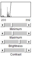 OSEAS HISTO